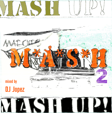 Cover des Mixtapes „Mash Up 2“